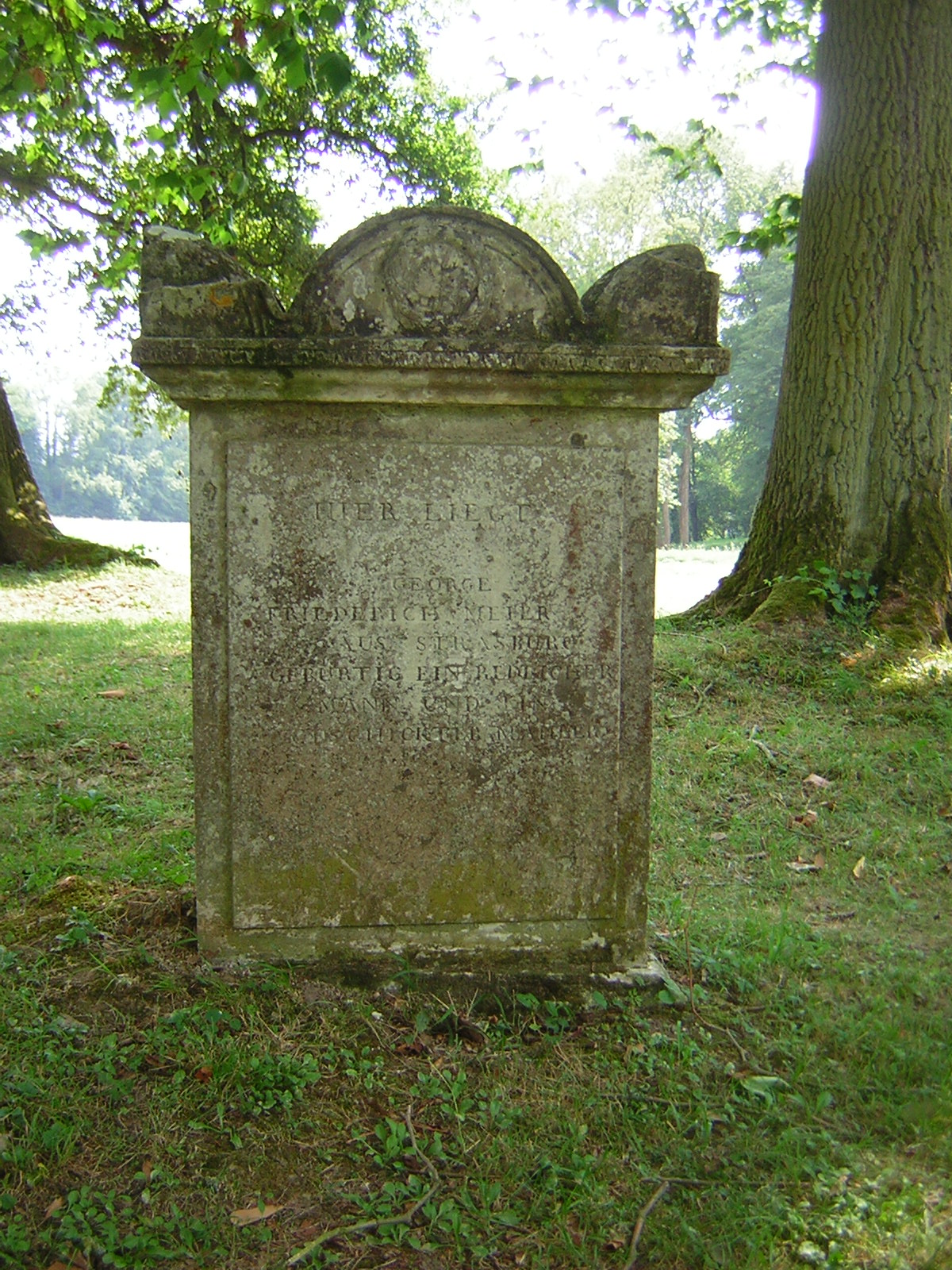 Ermenonville Tombe du peintre Georges-Frédéric Meyer